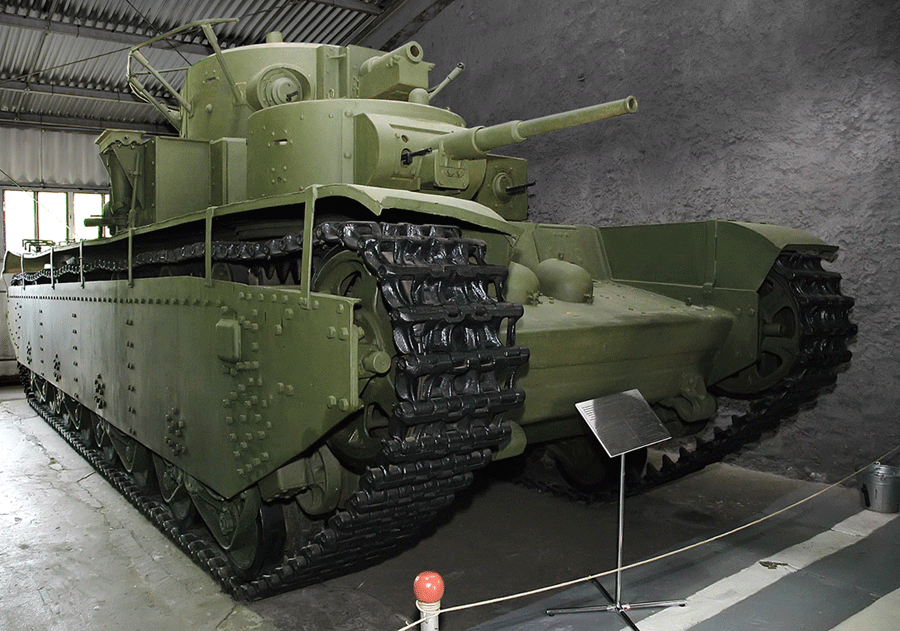 Т-35 в бронетанковом музее в Кубинке